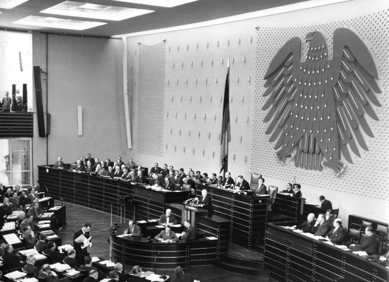 2. Lesung der Pariser Verträge im Deutschen Bundestag am 25. Februar 1955